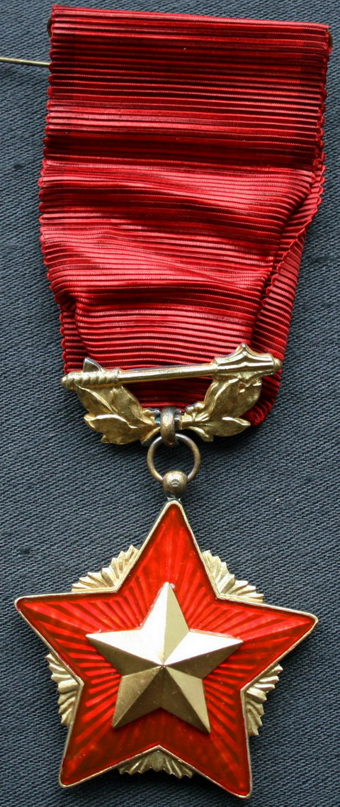 Орден Красного Знамени (ЧССР)